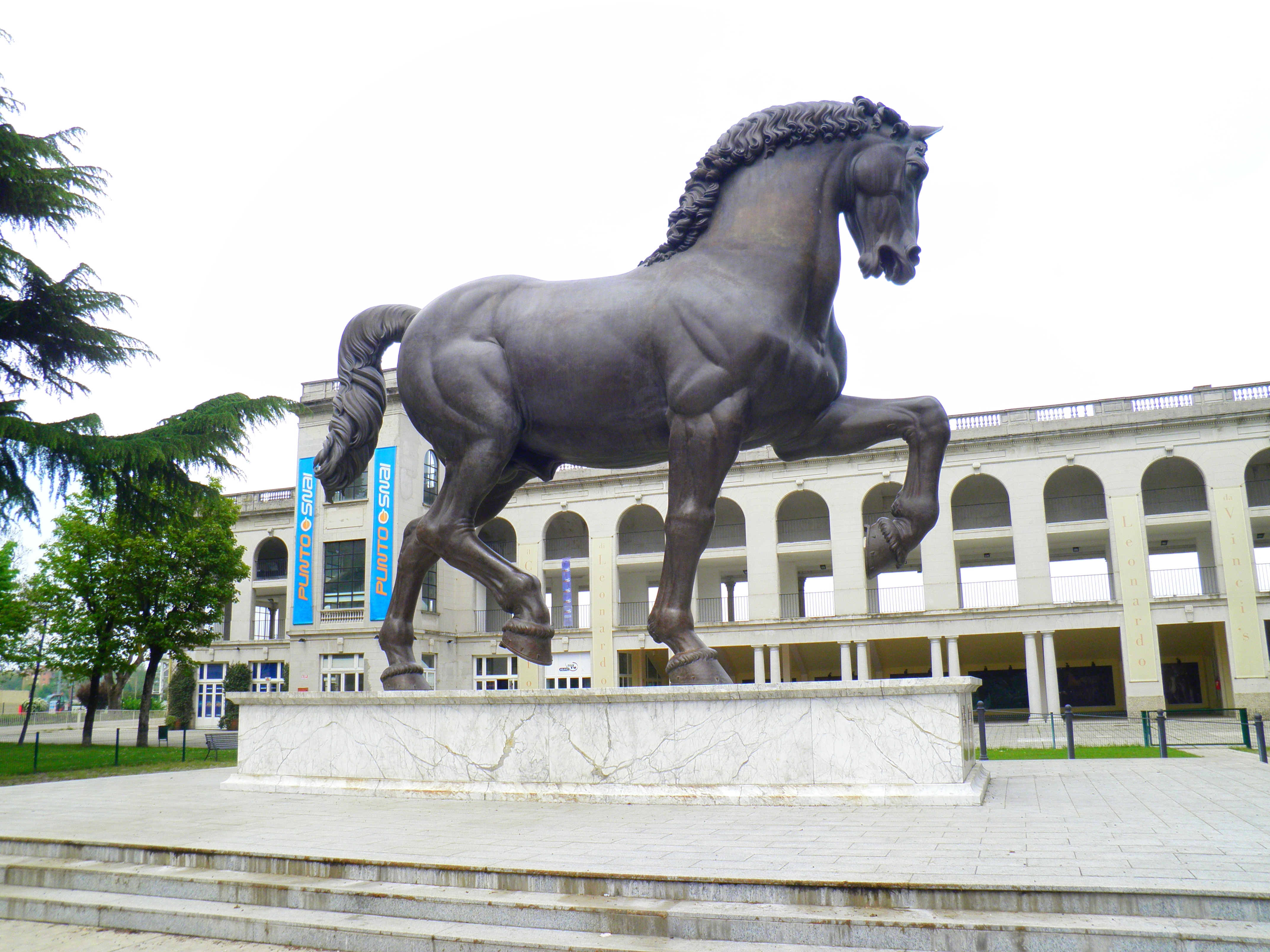 Ippodromo del Galoppo